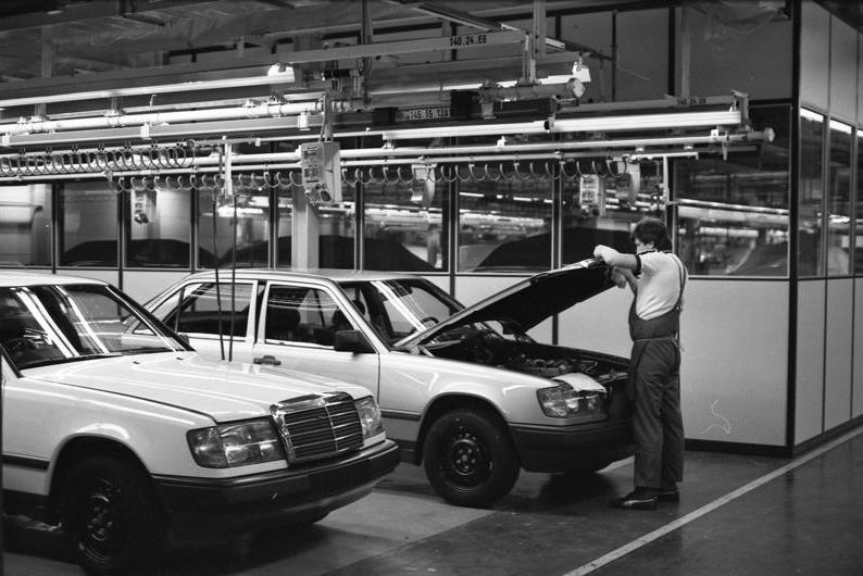 Juni 1988 Stuttgart-Untertürkheim, Daimler-Benz-Werk